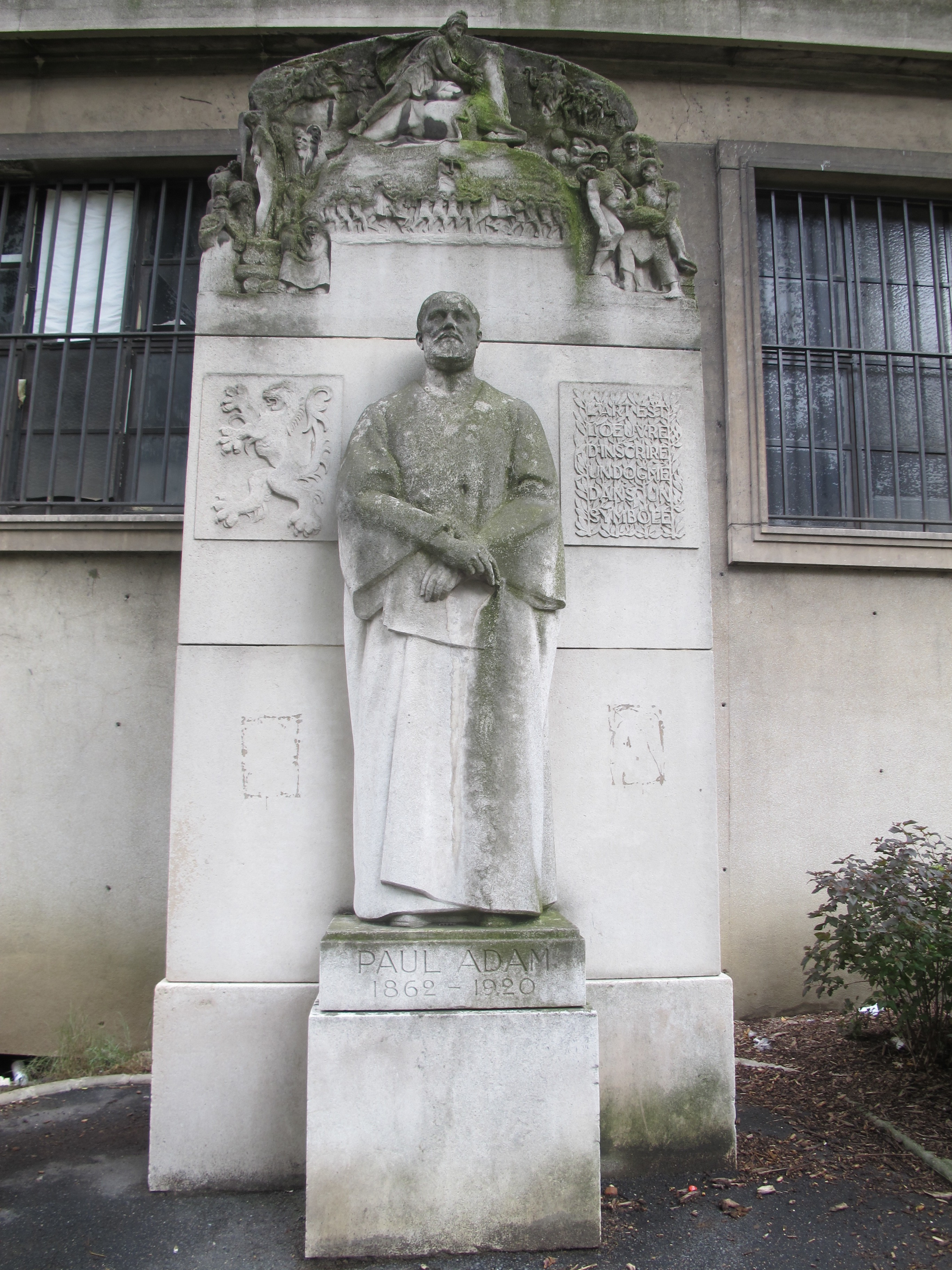 Monument à Paul Adam, au Trocadéro (jardins), le long de l'avenue du président-Wilson (Paris, 16e). Inscription : L'art est l’œuvre d'inscrire un dogme dans un symbole.